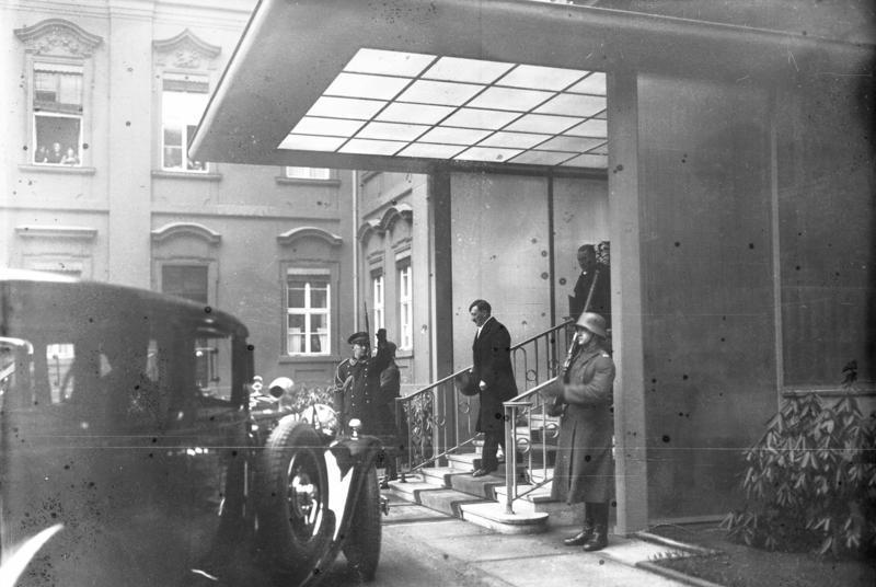 Der große Neujahrs-Empfang beim Reichspräsidenten von Hindenburg am 1. Januar 1934! Der Reichskanzler Adolf Hitler verläßt das Reichspräsidenten Palais in der Wilhelmstrasse nach dem Empfang.